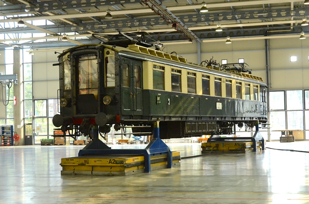 Hoofdwerkplaats Haarlem - mC 9002 'Jaap' op luchtkussensFoto: Erik Swierstra.